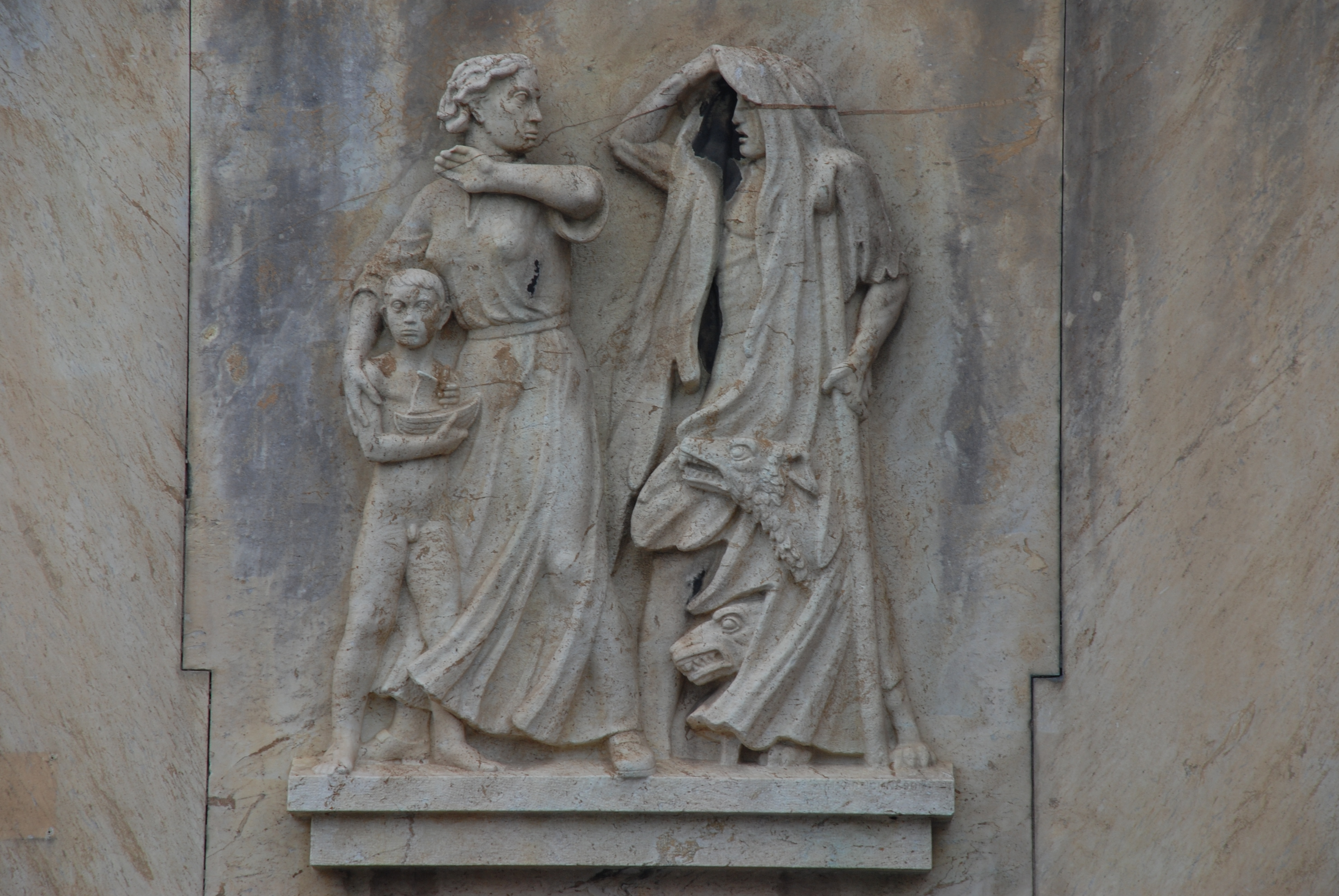 Thulehuset vid hörnet av Norra Hamngatan 18 och Östra Hamngatan 30-34 vid Brunnsparken i stadsdelen Nordstaden i Göteborg. Sandstensrelief av I Johnson.